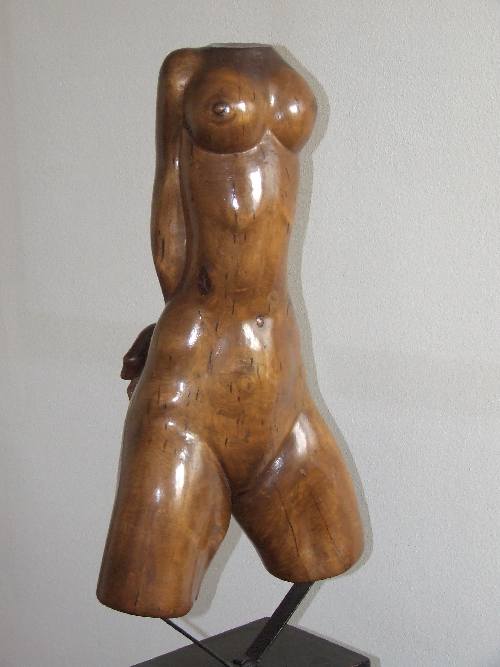 Scultura in legno di noce selvatico